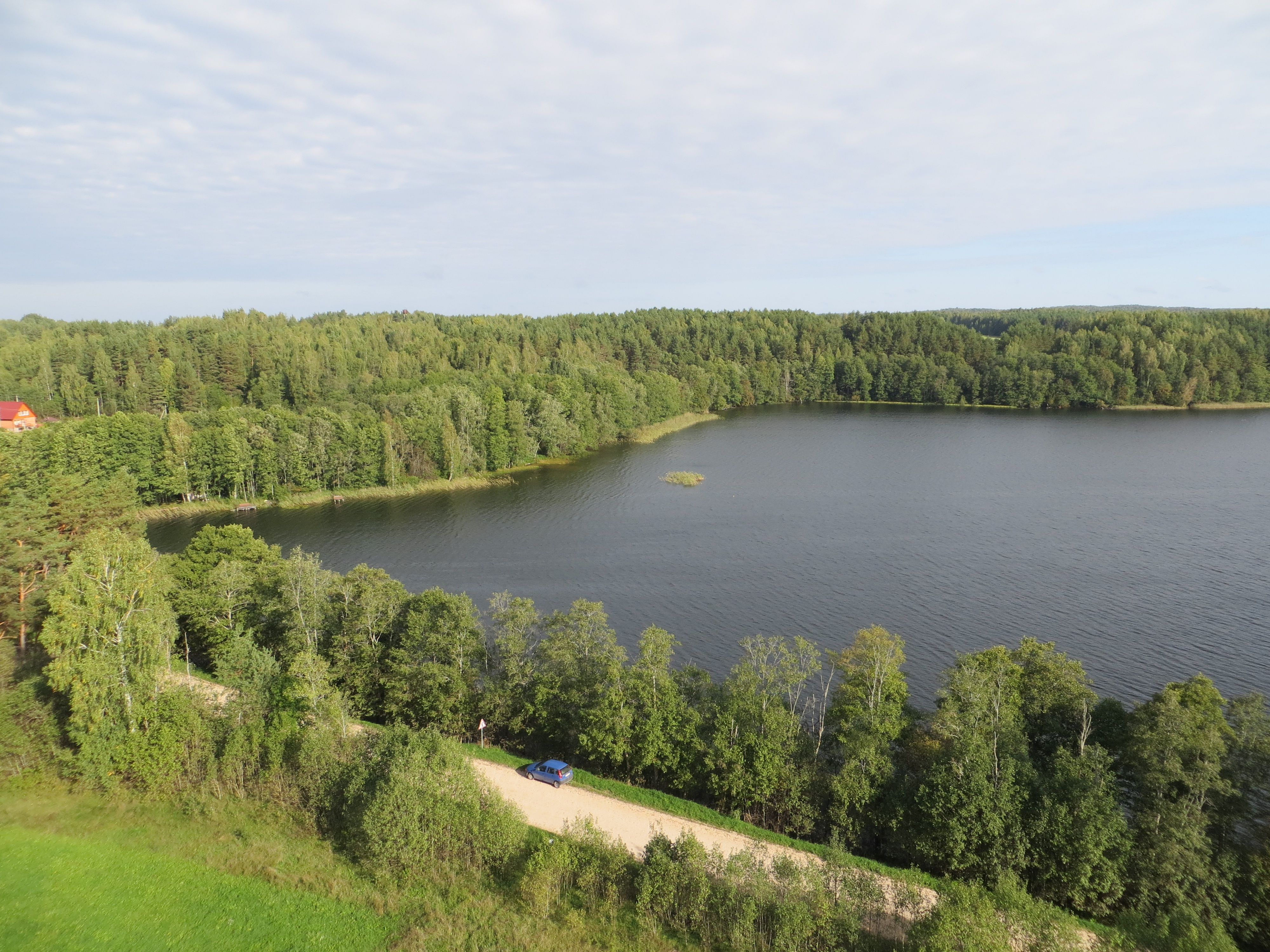 Kazitiškio sen., Lithuania